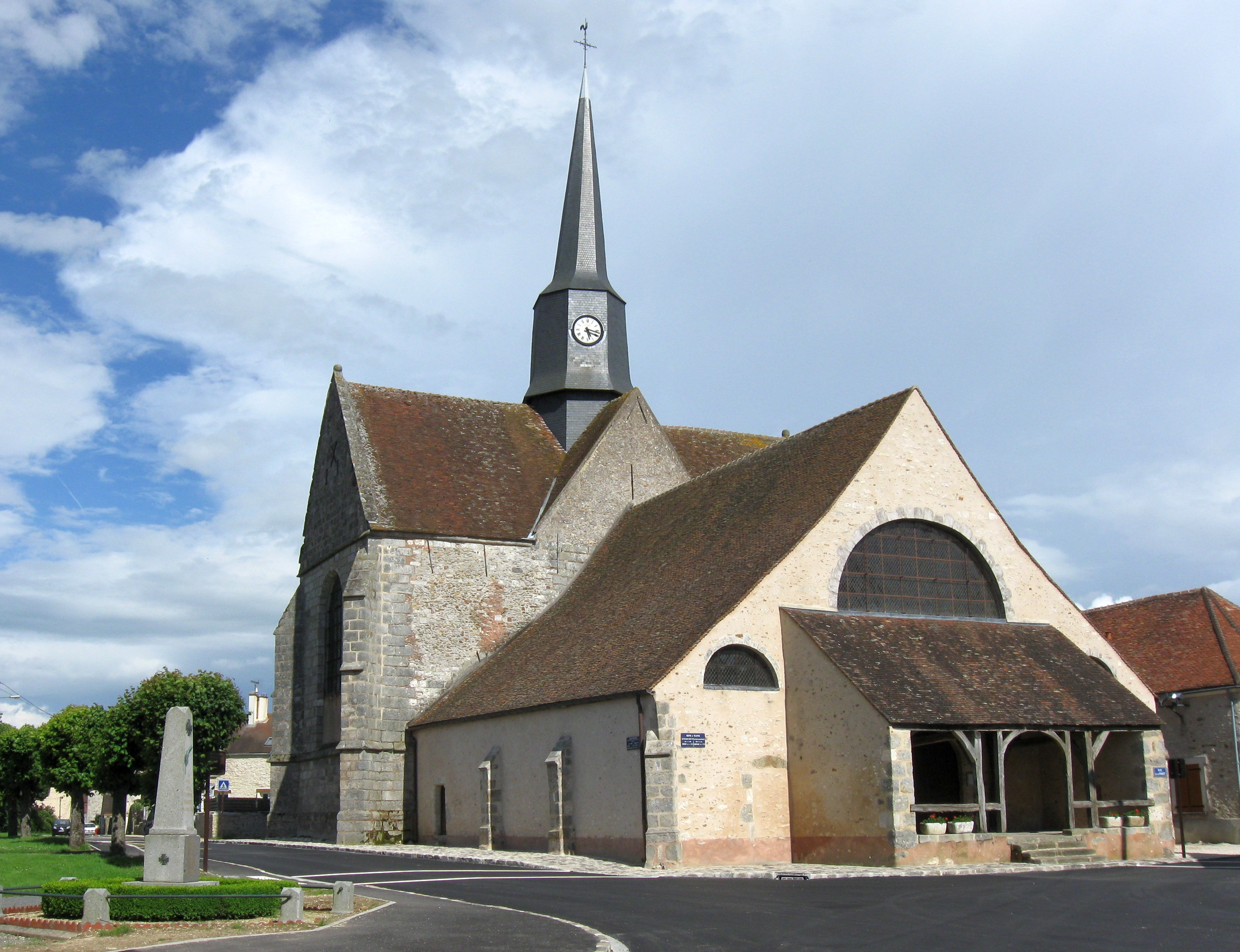 Église de l’Assomption-et-Saint-Jean-Baptiste de Bannost. (Seine-et-Marne, région Île-de-France).